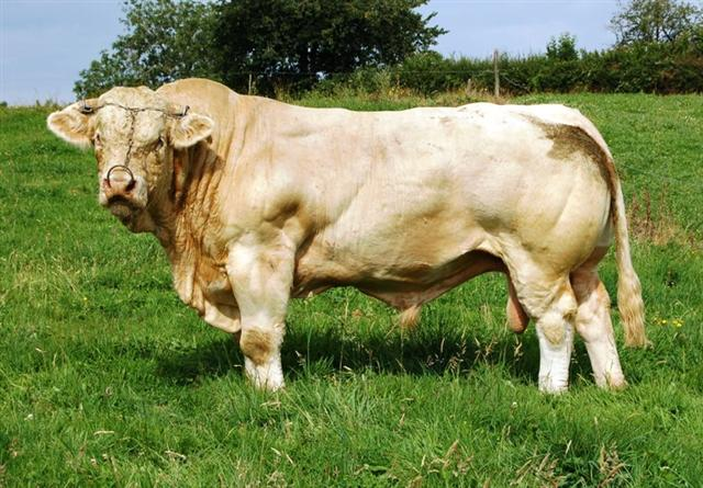 Taureau charolais (France).